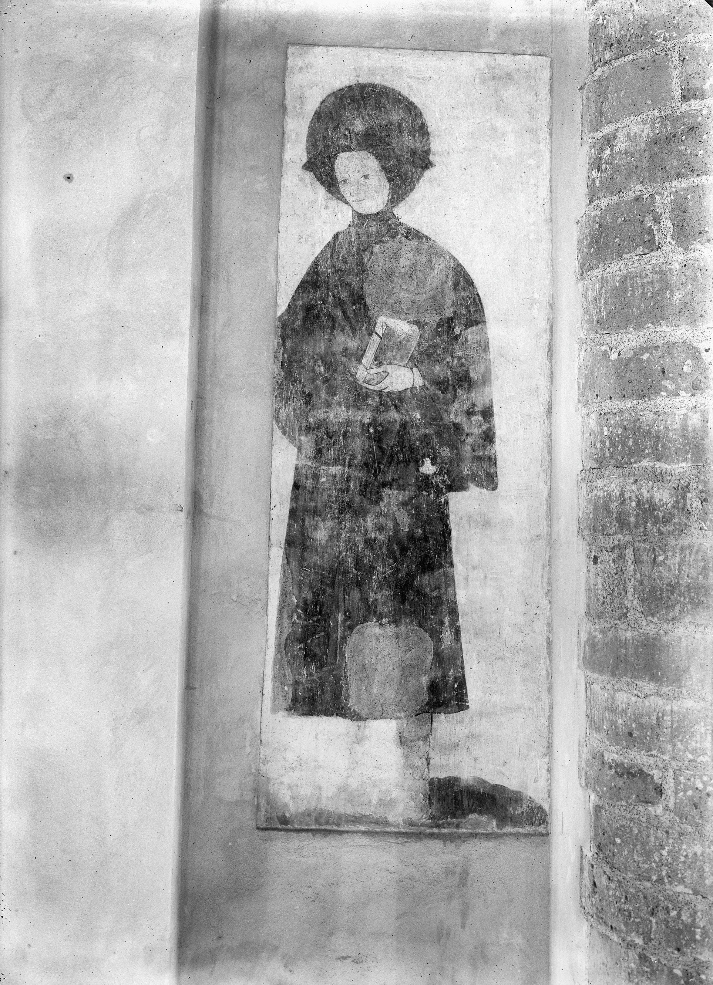 Nederlands Hervormde Kerk: Muurschildering